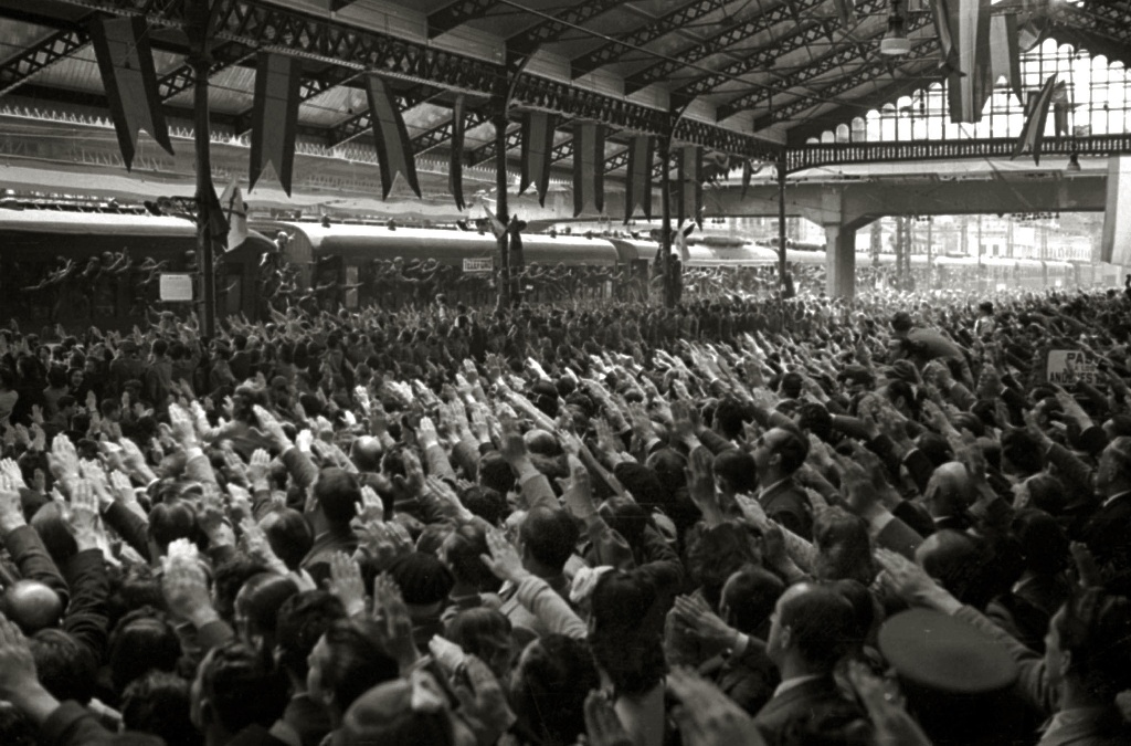 Título original: Llegada de integrantes de la División Azul a la estación del Norte (33/40) Localización: San Sebastián (Guipúzcoa)